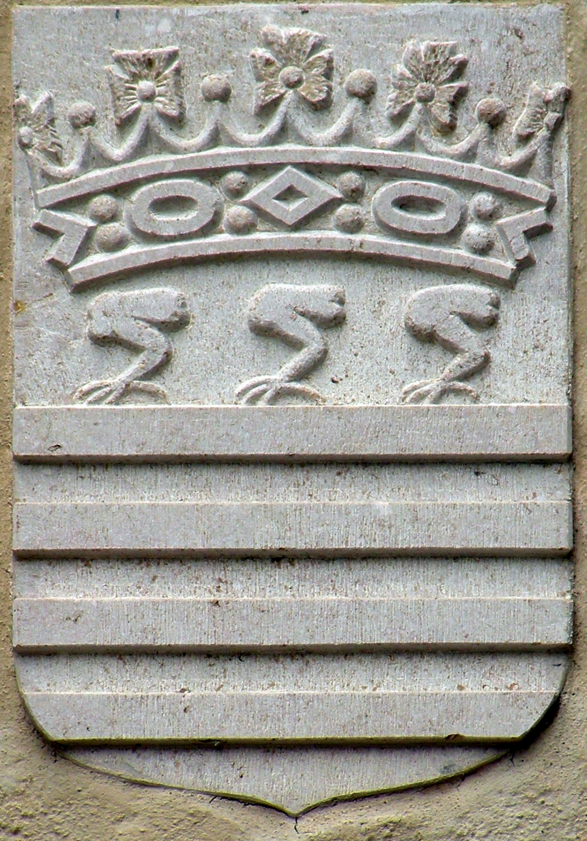 Wappen der Burgherren Pálffy (Besitzer der Wasserburg Heidenreichstein ab der 2. Hälfte des 17. Jahrhunderts bis 1947)